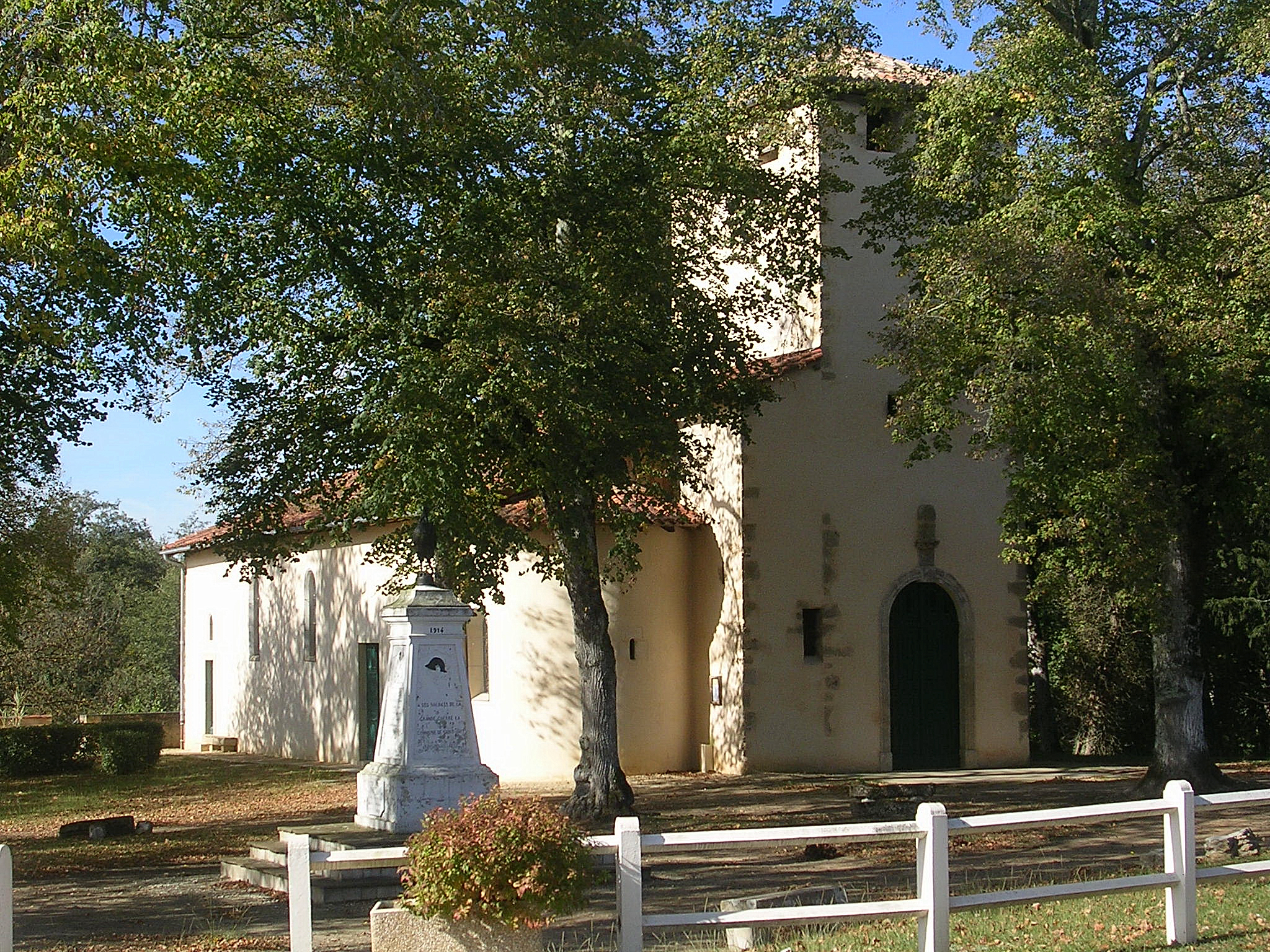 Eglise de Saint-Avit (Landes, France)